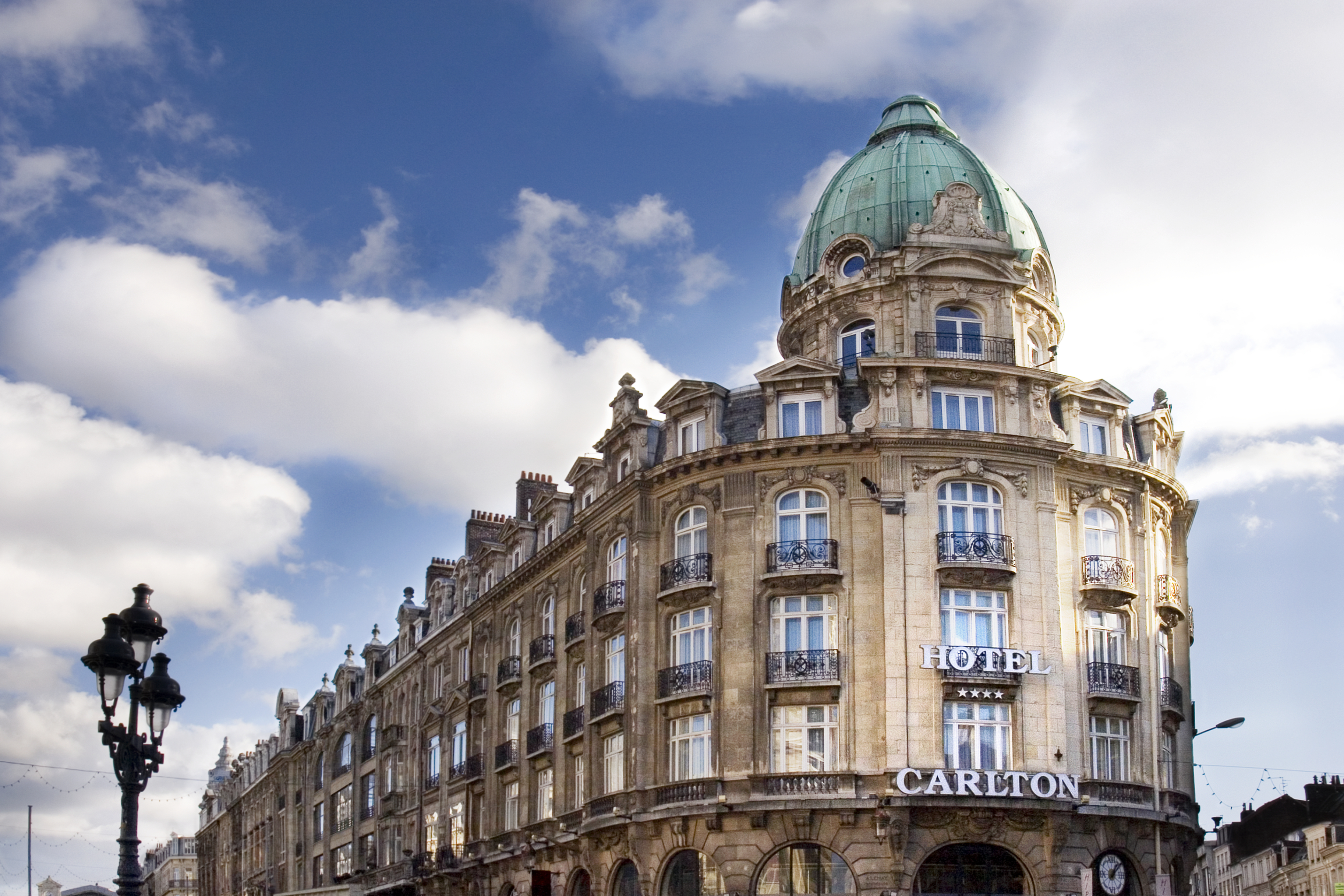 Photo façade Carlton